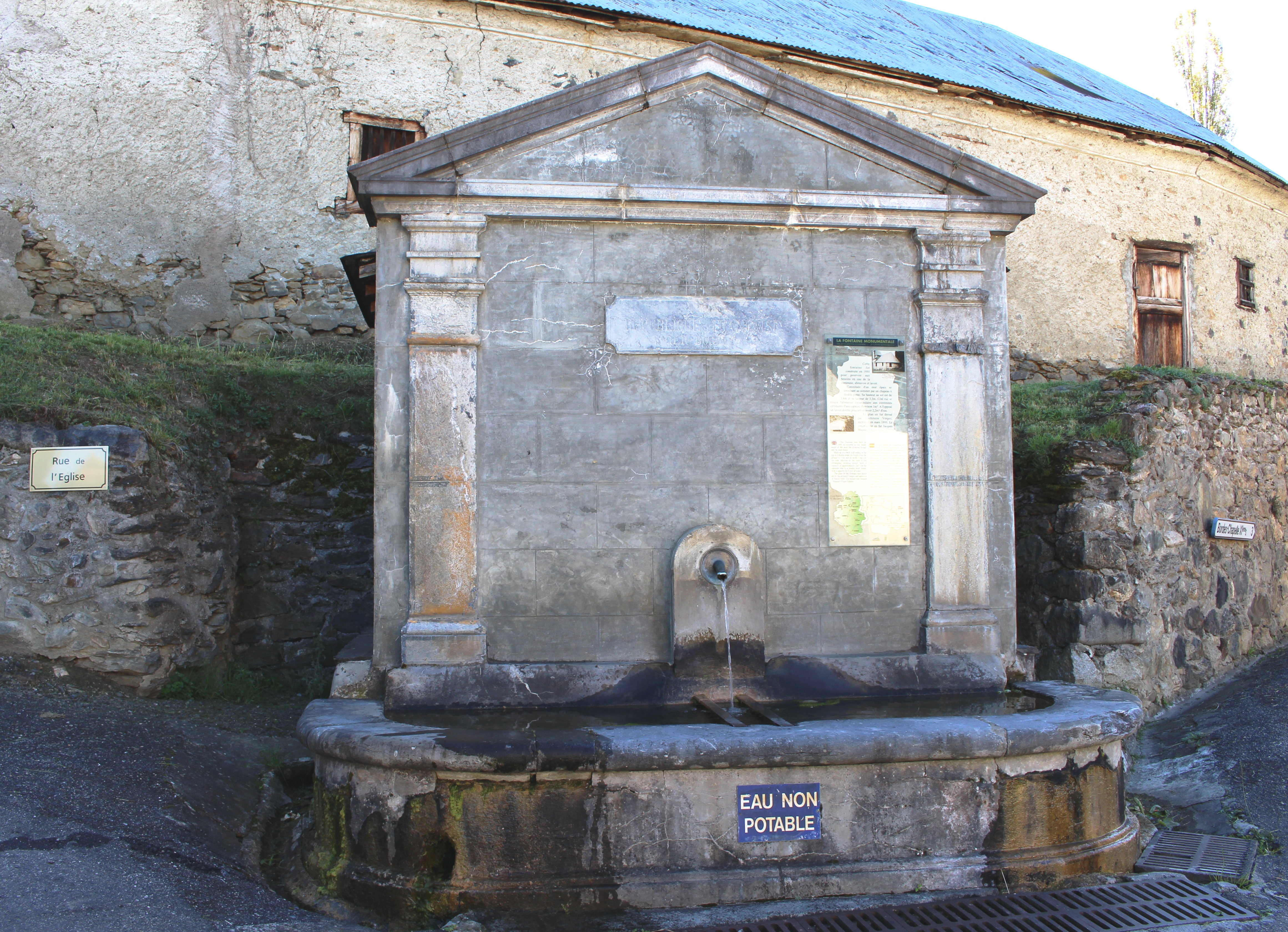 Fontaine de Vier-Bordes (Hautes-Pyrénées)